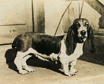 бассет-хаунд, гончая, бассет